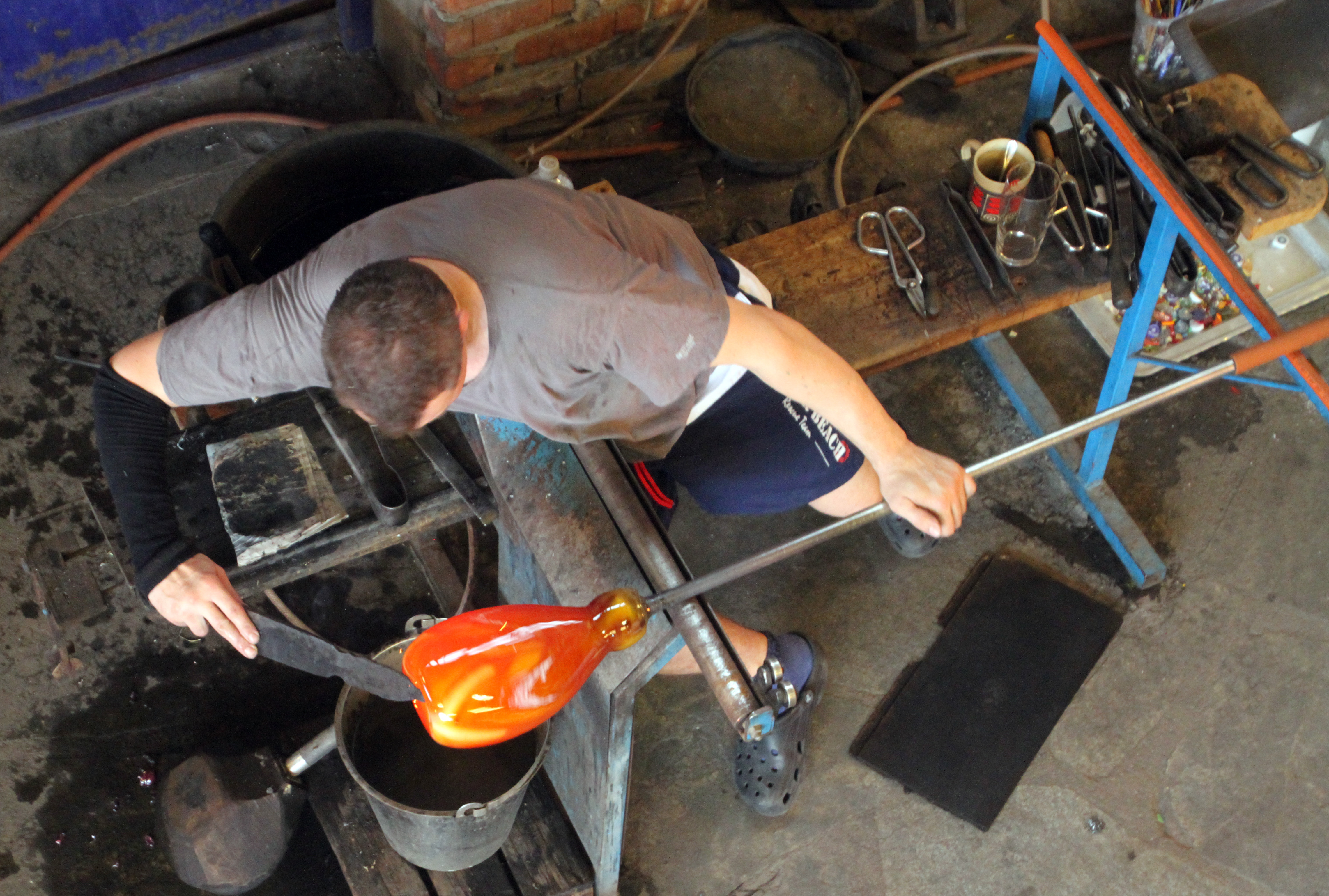 Vikten, Flakstadøy, Lofoten, Norwegen